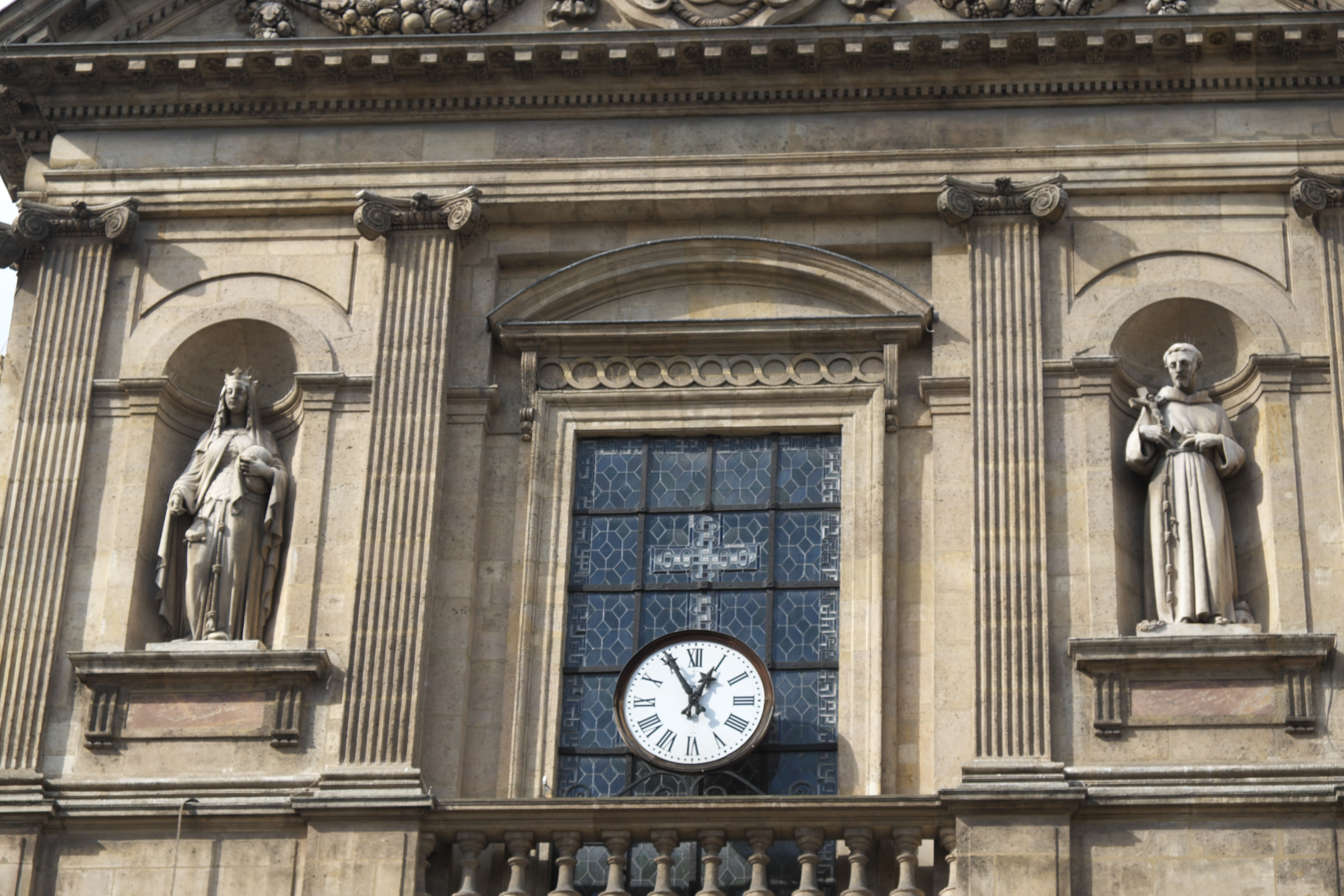 Katholische Pfarrkirche Ste-Élisabeth im 3. Arrondissement in Paris (Île-de-France/Frankreich)